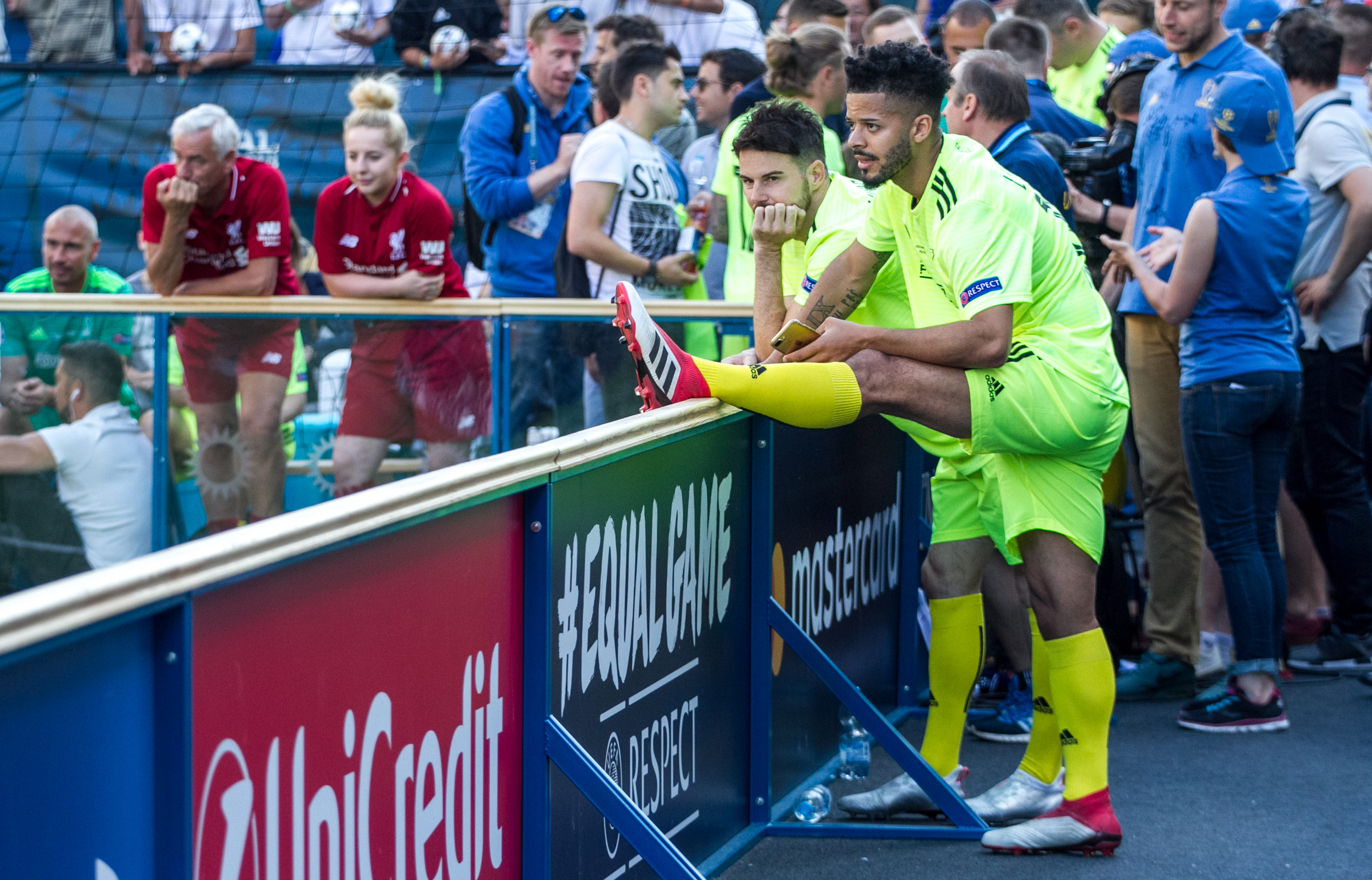 Турнир чемпионов звезд Лиги чемпионов УЕФА, Киев, 2018